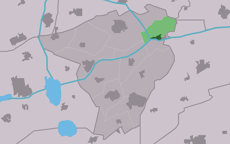 Kaartsje fan himrik fan Gerkeskleaster